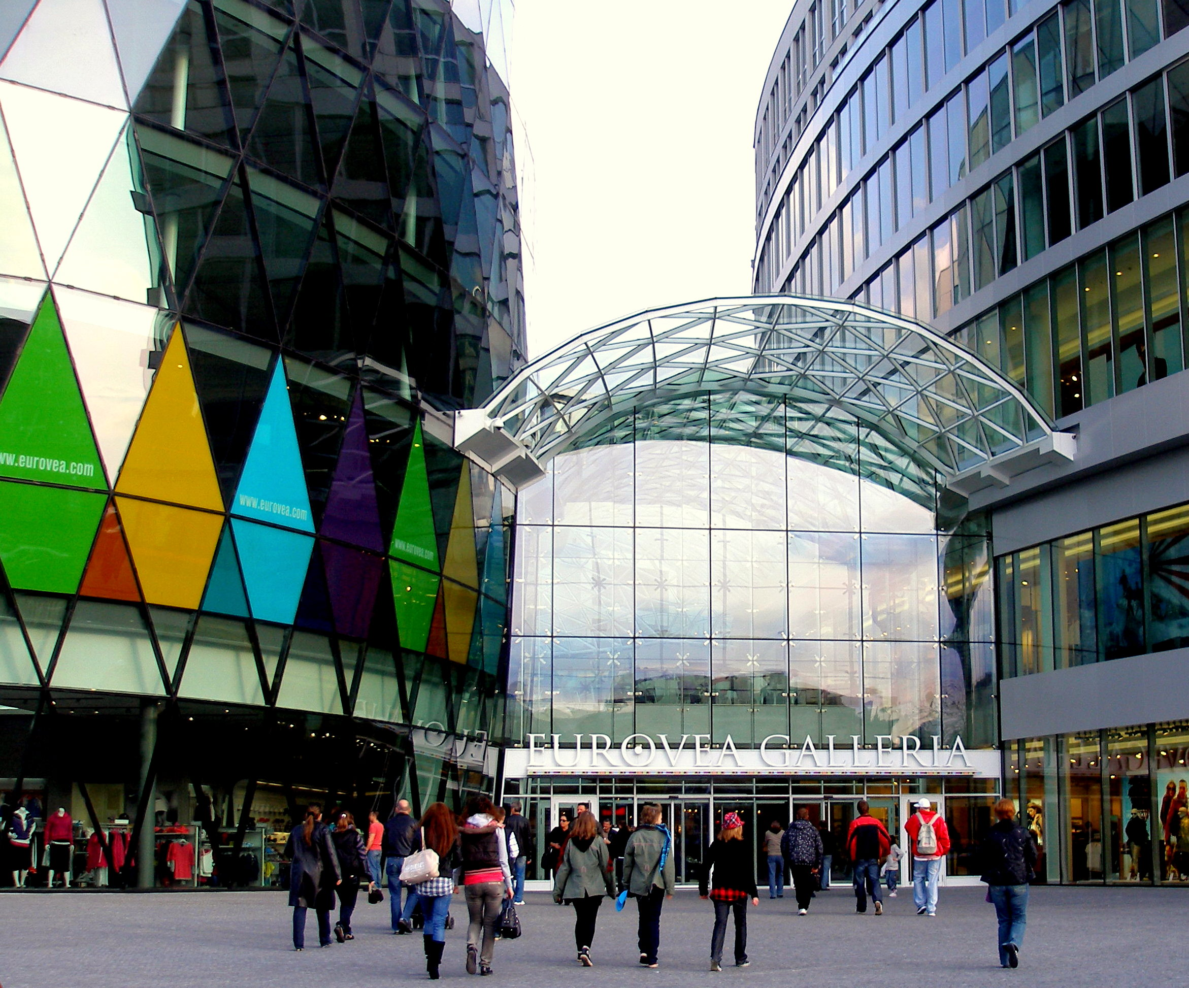 Nová bratislavská čtvrť Eurovea